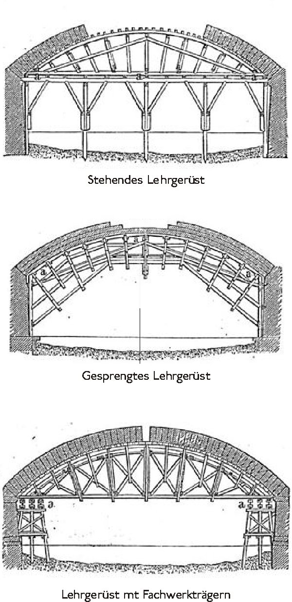 Darstellung zeigt verschiedene Arten von Lehrgerüsten, entnommen aus dem Meyers Konversationslexikon von 1888, verändert von Benutzer:Sansculotte.